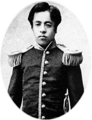 南部利恭の肖像写真。